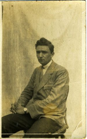 נחום איתן בבגרותו. התמונה באדיבות אורה ספיר.